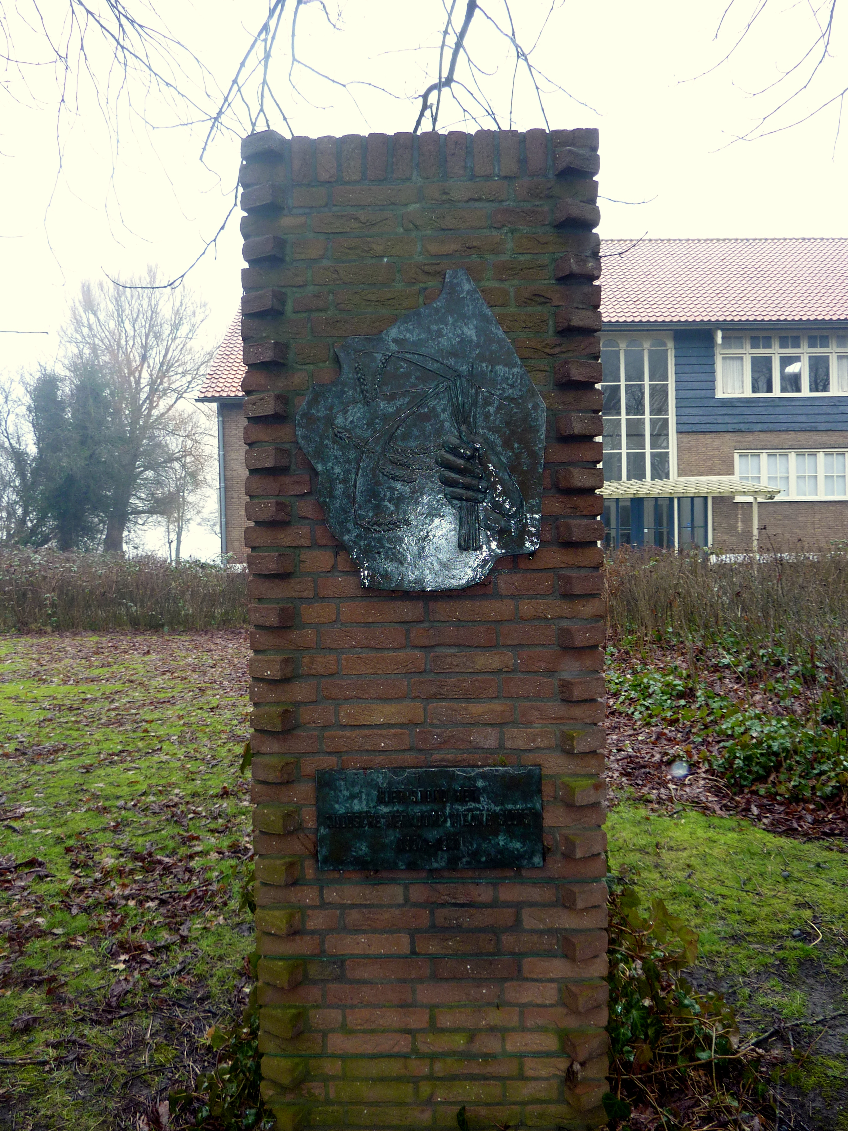 Monument bij gemeenschapsgebouw, Slootdorp